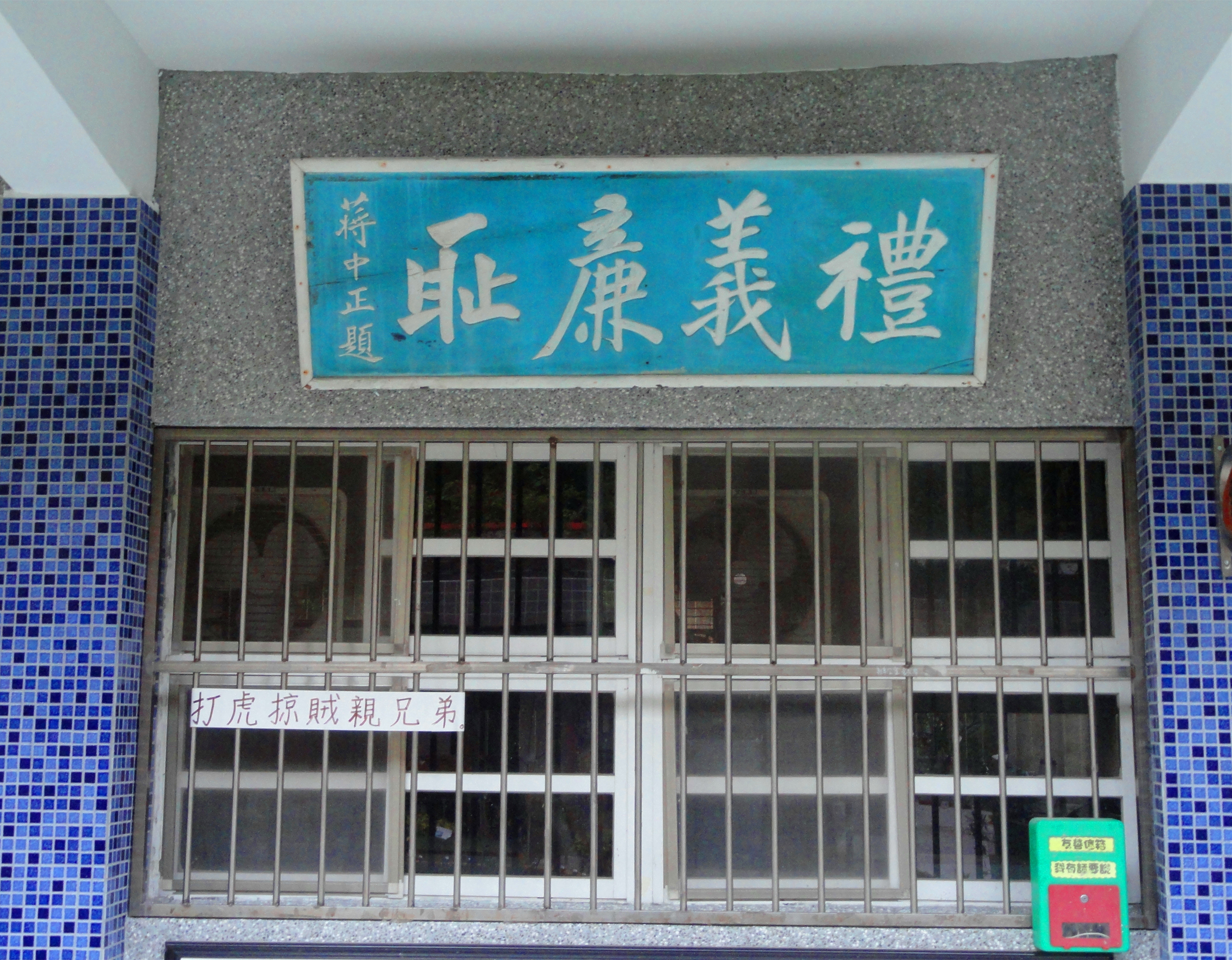 在台湾各地国小可见的“礼义廉耻”匾牌